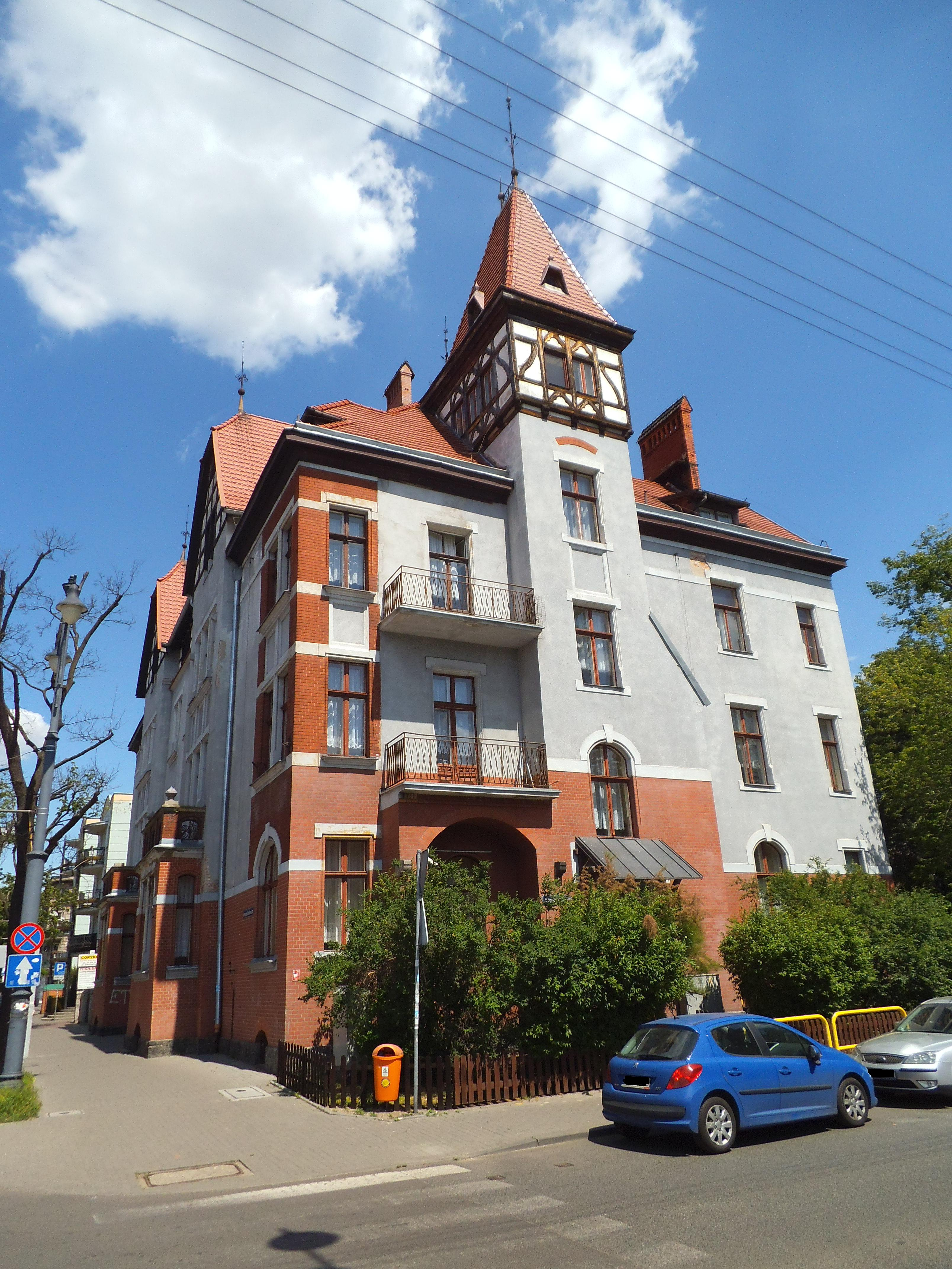 Placówka opiekuńczo-wychowawcza - "Młody Las" w Toruniu